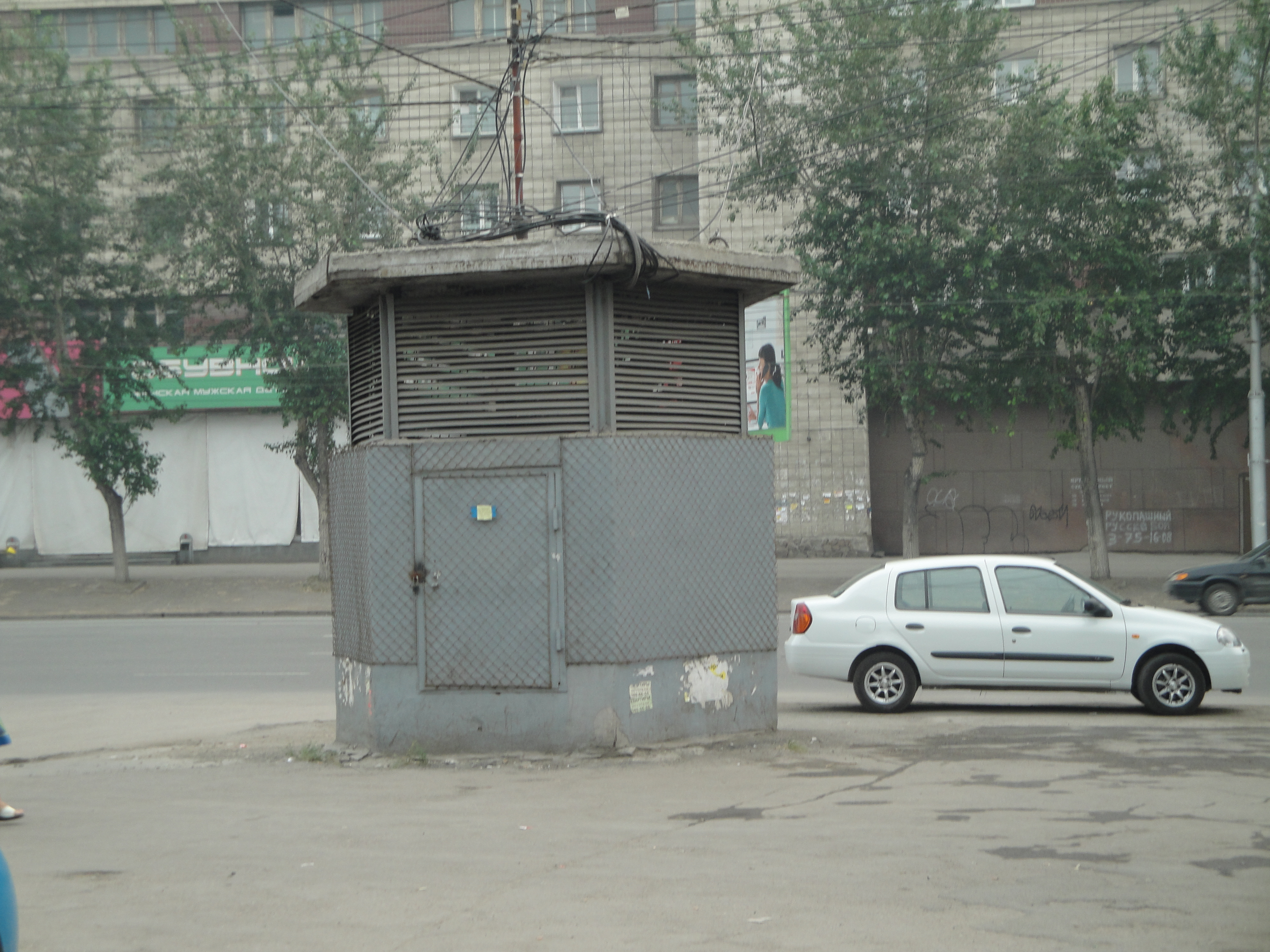 Вентиляционная шахта туннеля за станцией "Площадь Маркса". Расположена вначале улицы Титова, в районе её примыкания с улицами Блюхера и Покрышкина.